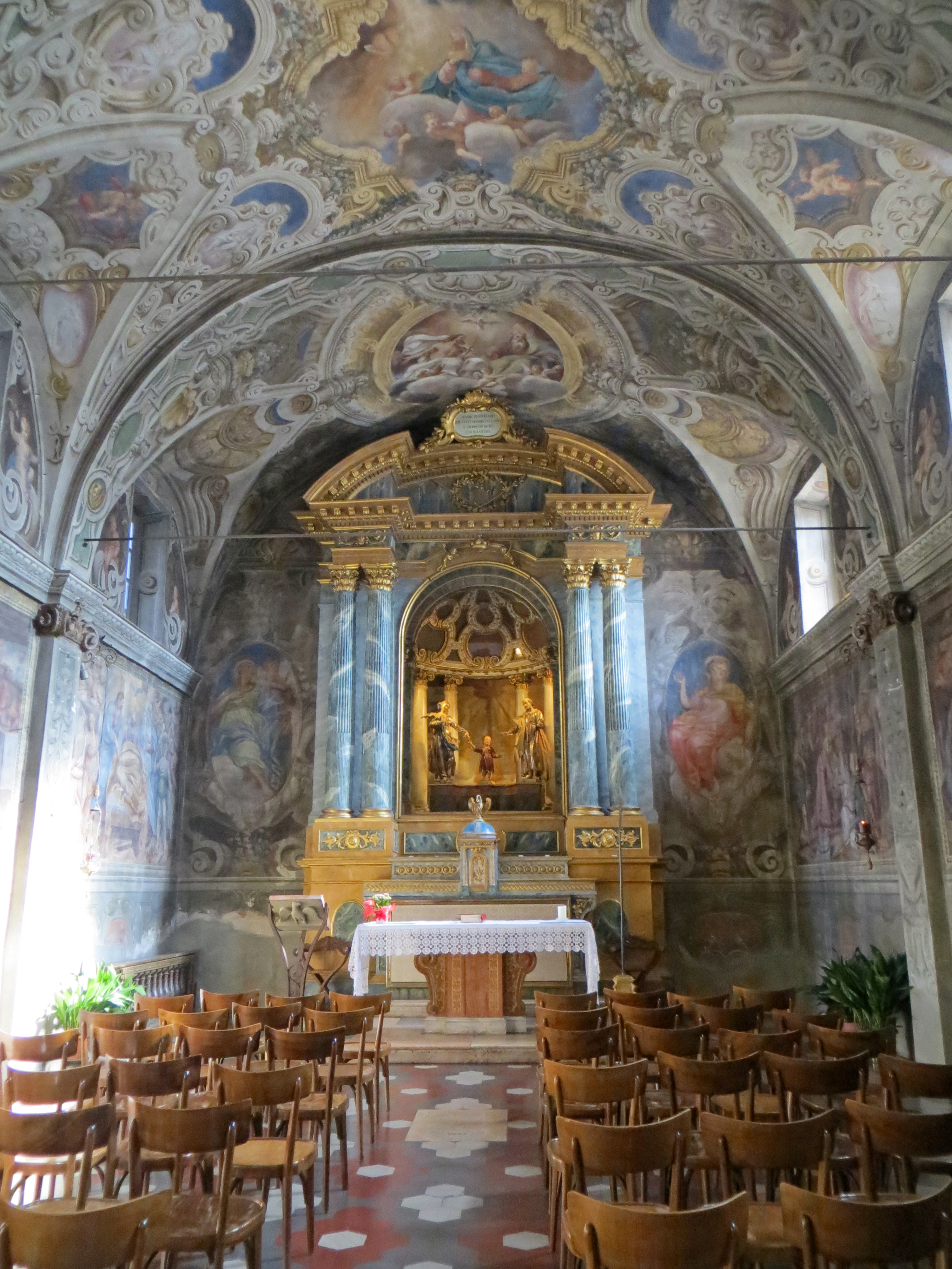 Chiesa di Santa Croce (Parma) - cappella di San Giuseppe